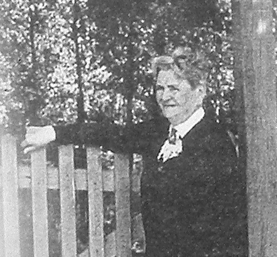 Felicitas Rose (Foto aus einer öffenltich aufgestellten Infotafel)